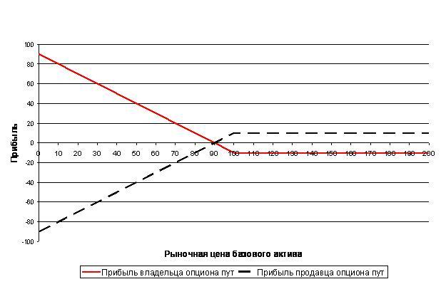 График зависимости доходности по опциону пут от изменения рыночной стоимости базового актива